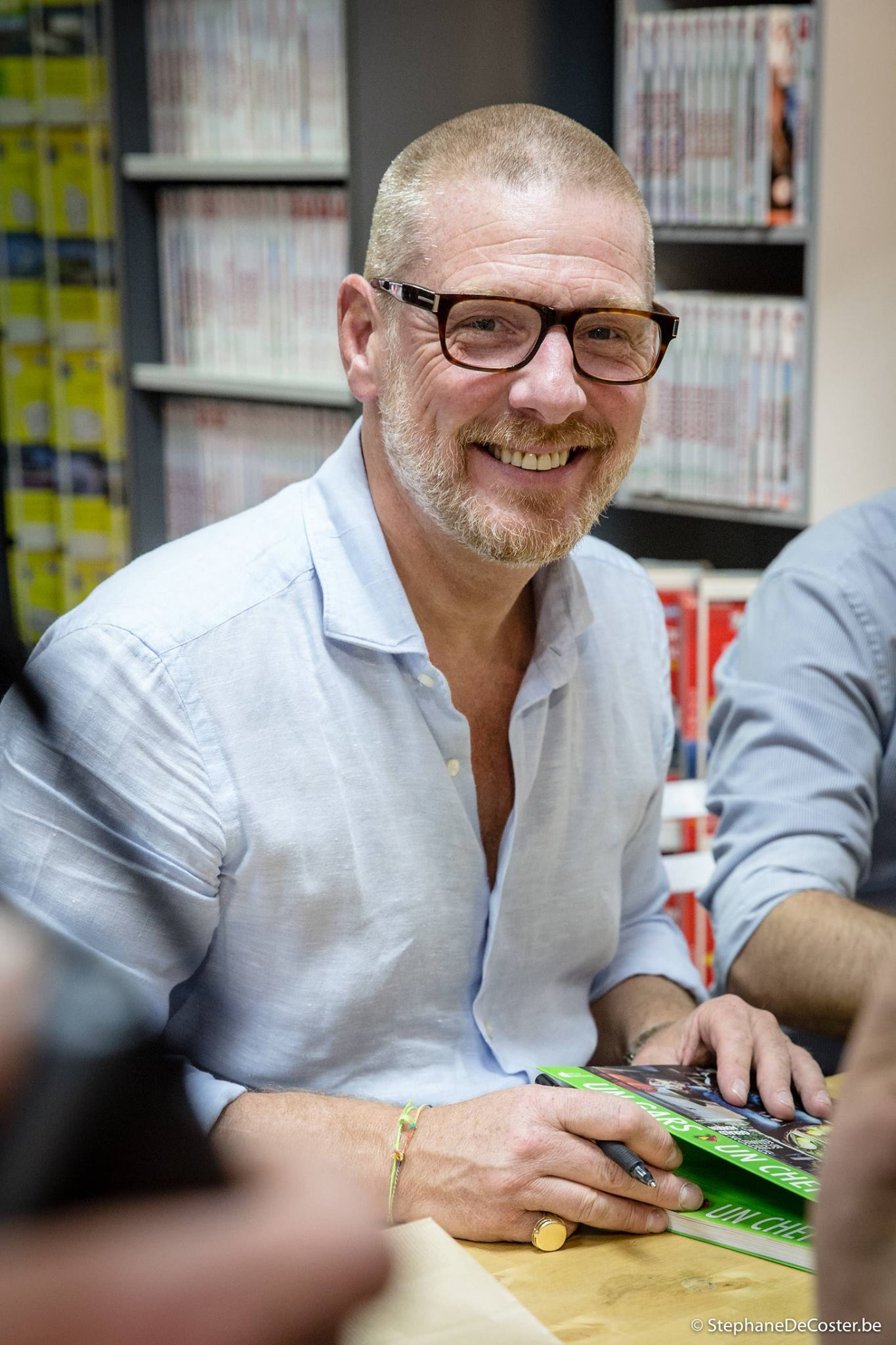 Gerald Watelet en dédicaces à la librairie Huwart en juin 2016 pour la sortie du 3ème tome des recettes de 'Un Gars Un Chef'.